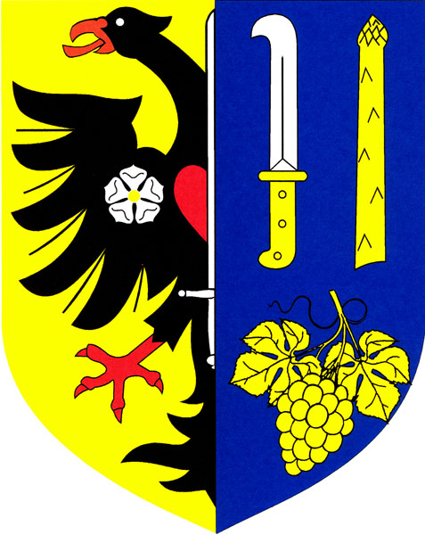 Znak obce Trboušany